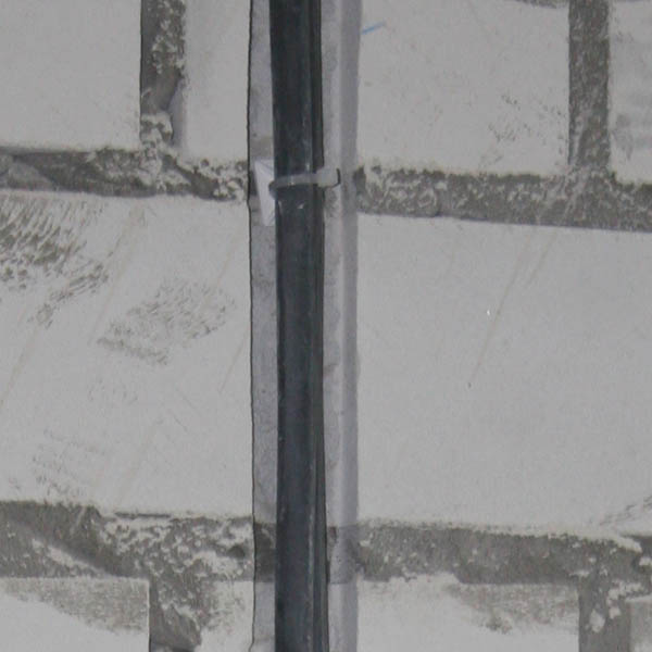 Штроба прорезанная в кирпичной кладке с закреплённым в ней электрокабелем